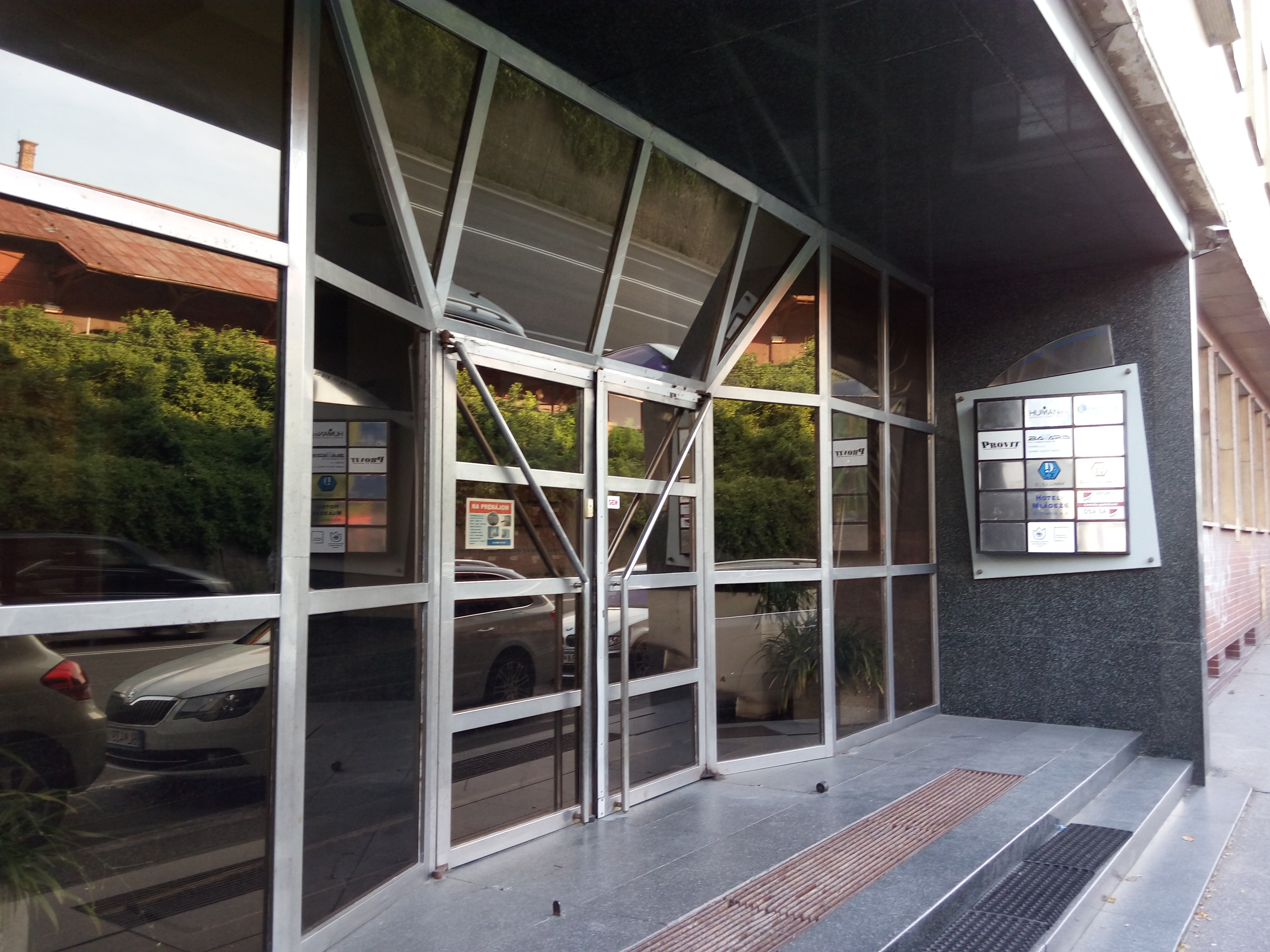 Pražská 11, Staré Mesto, Bratislava